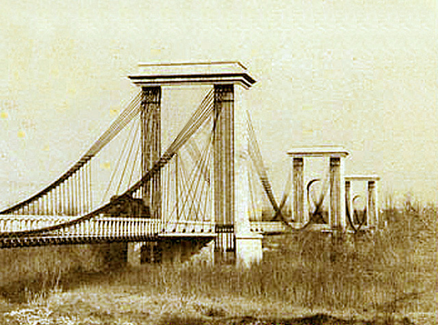 Pont construit en 1894, détruit en 1944